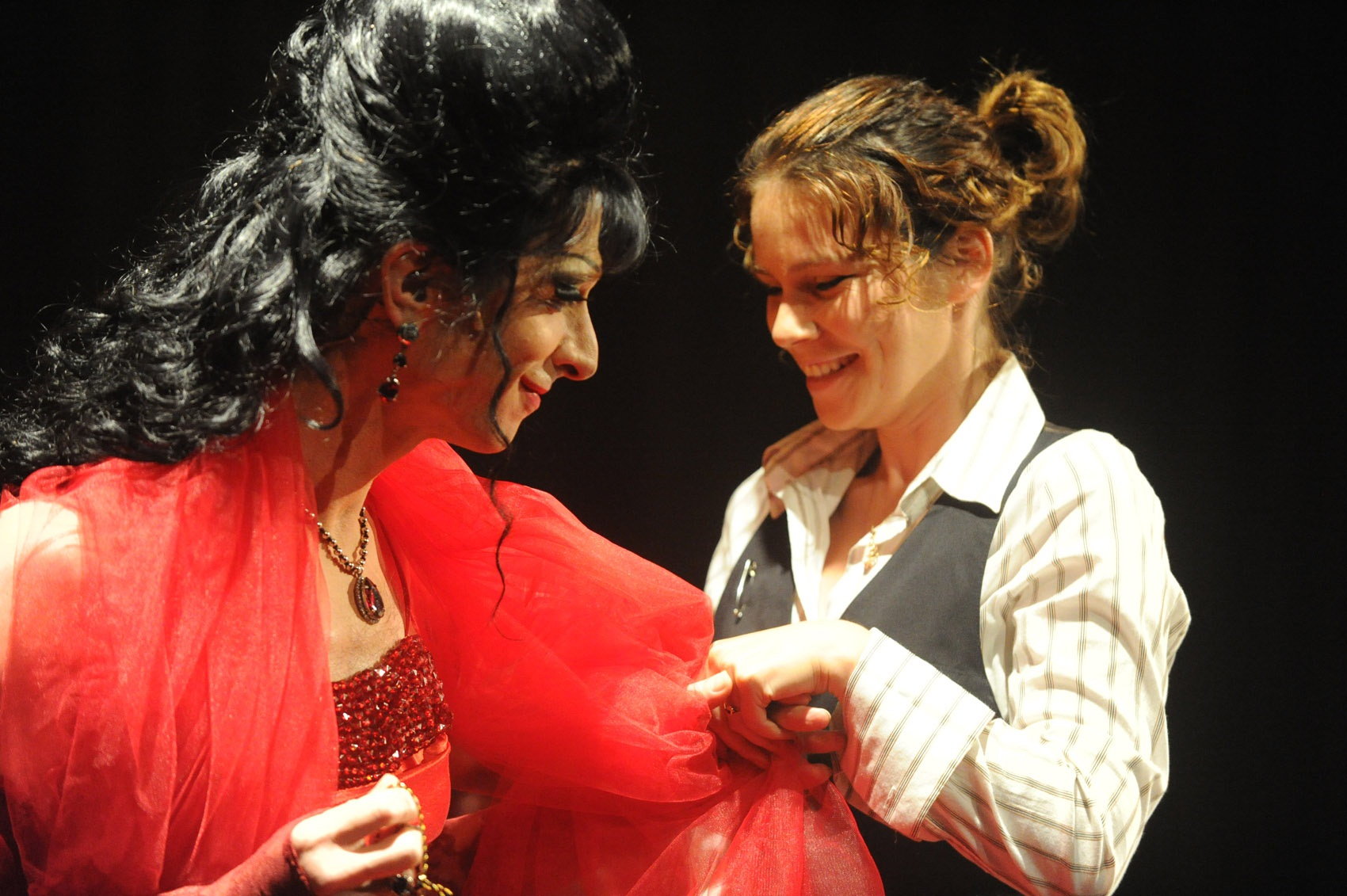 דנה מיינרט וסשה דמידוב בהצגה פרימה דונה, תיאטרון גשר